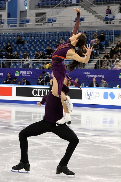 Мэдисон Чок и Эван Бейтс на чемпионате четырёх континентов 2017.